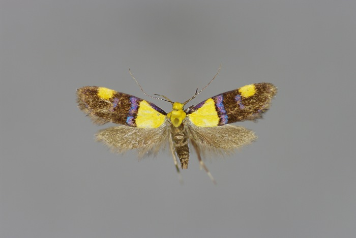 Oecophora bractella, Weibchen